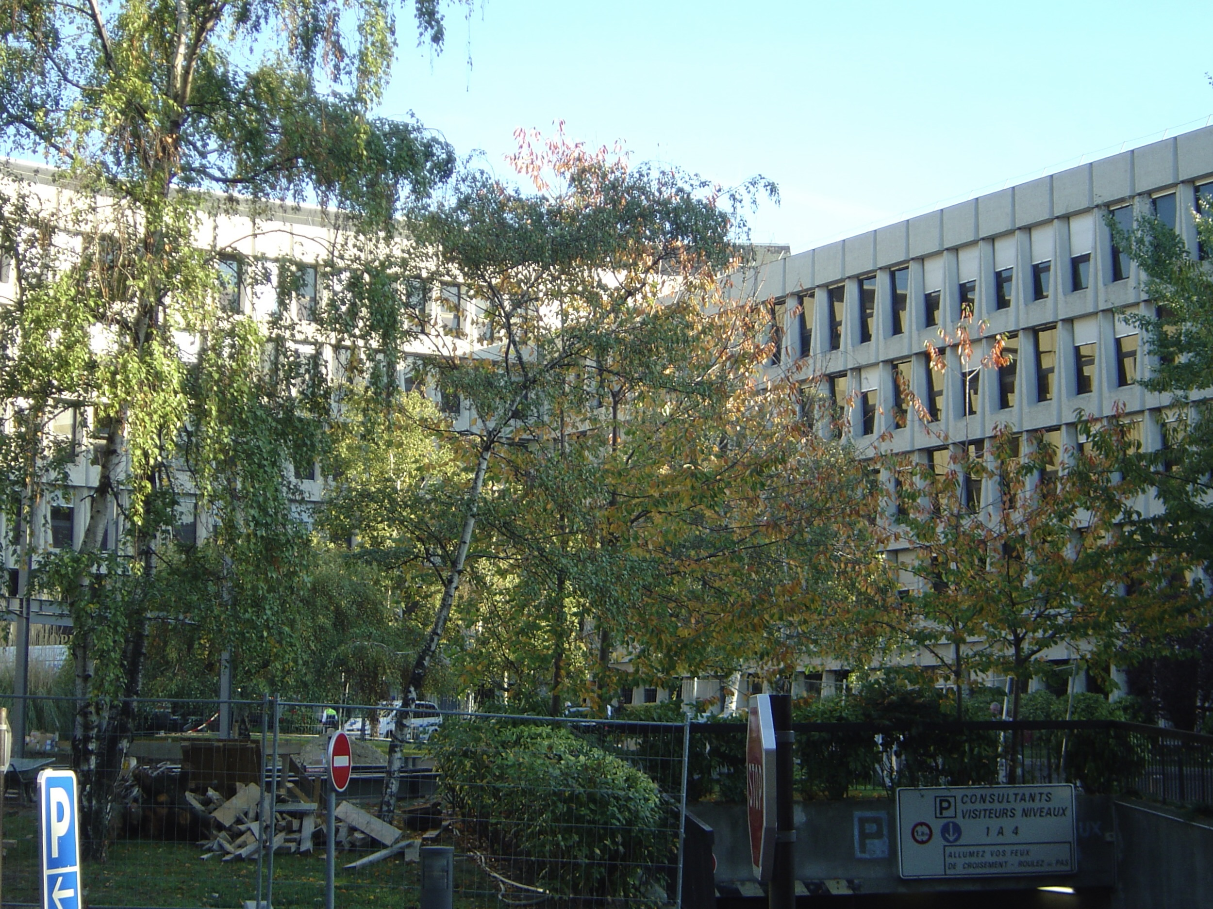 HIA Val-de-Grâce, Paris - Architecte Henri Pottier